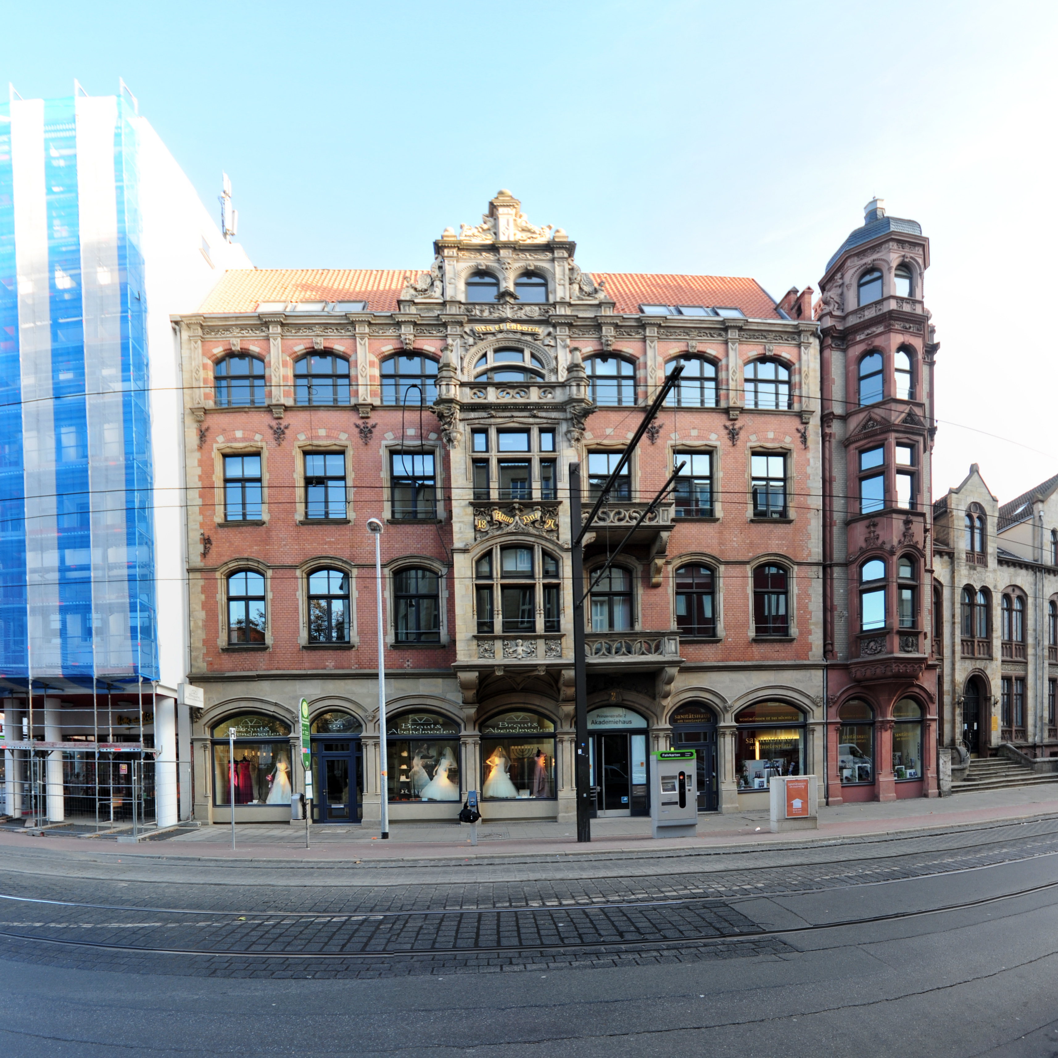 Diskussion zum Bildfilter in Hannover